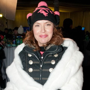 Вера Сотникова на четвёртом Кубке Audi по слалому среди звёзд